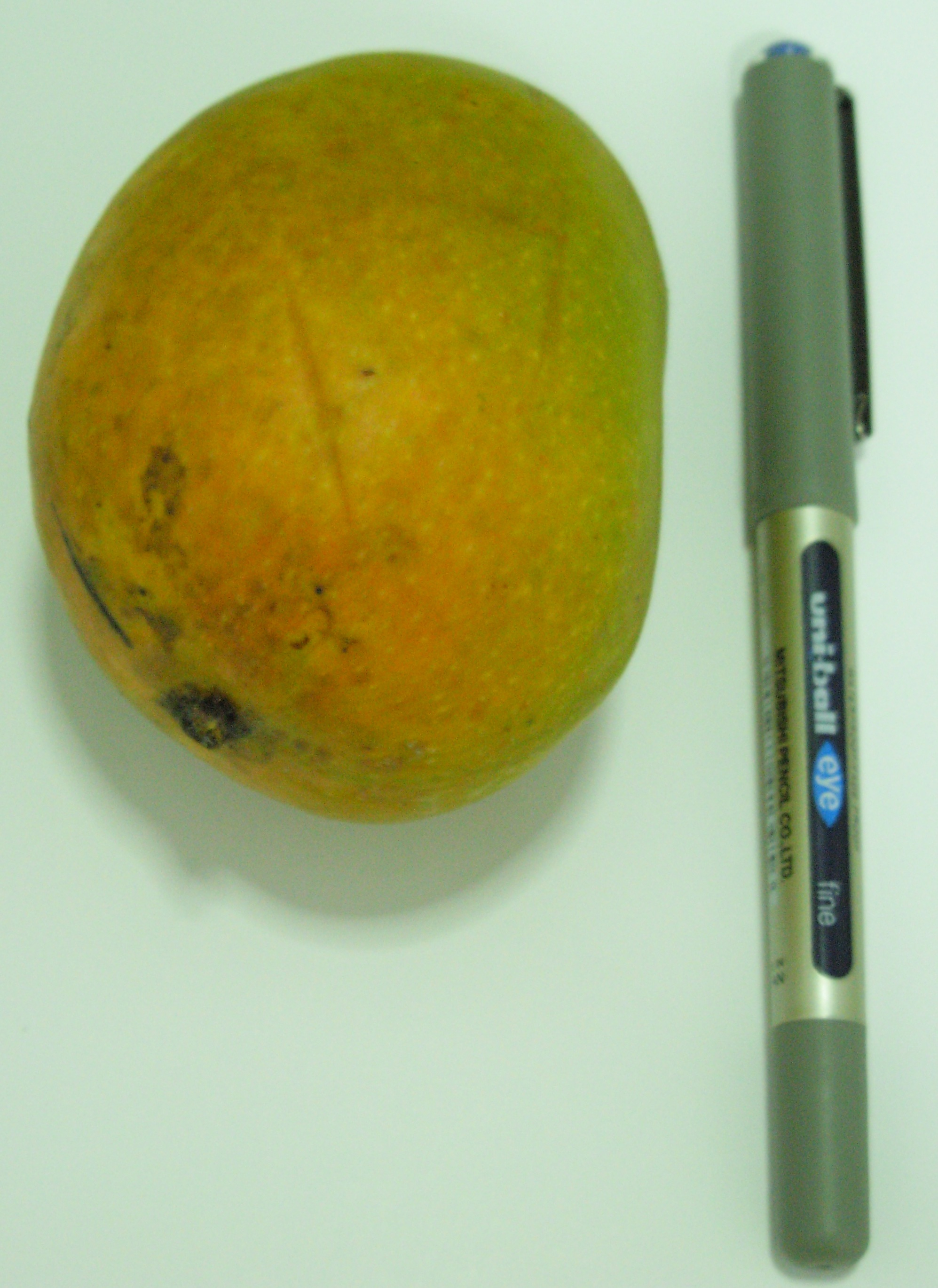 അൽഫോൺസാ മാങ്ങ